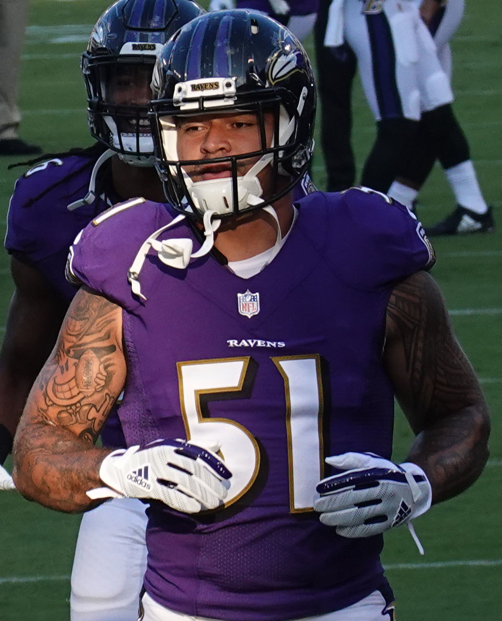 Rams at Ravens 8/9/18